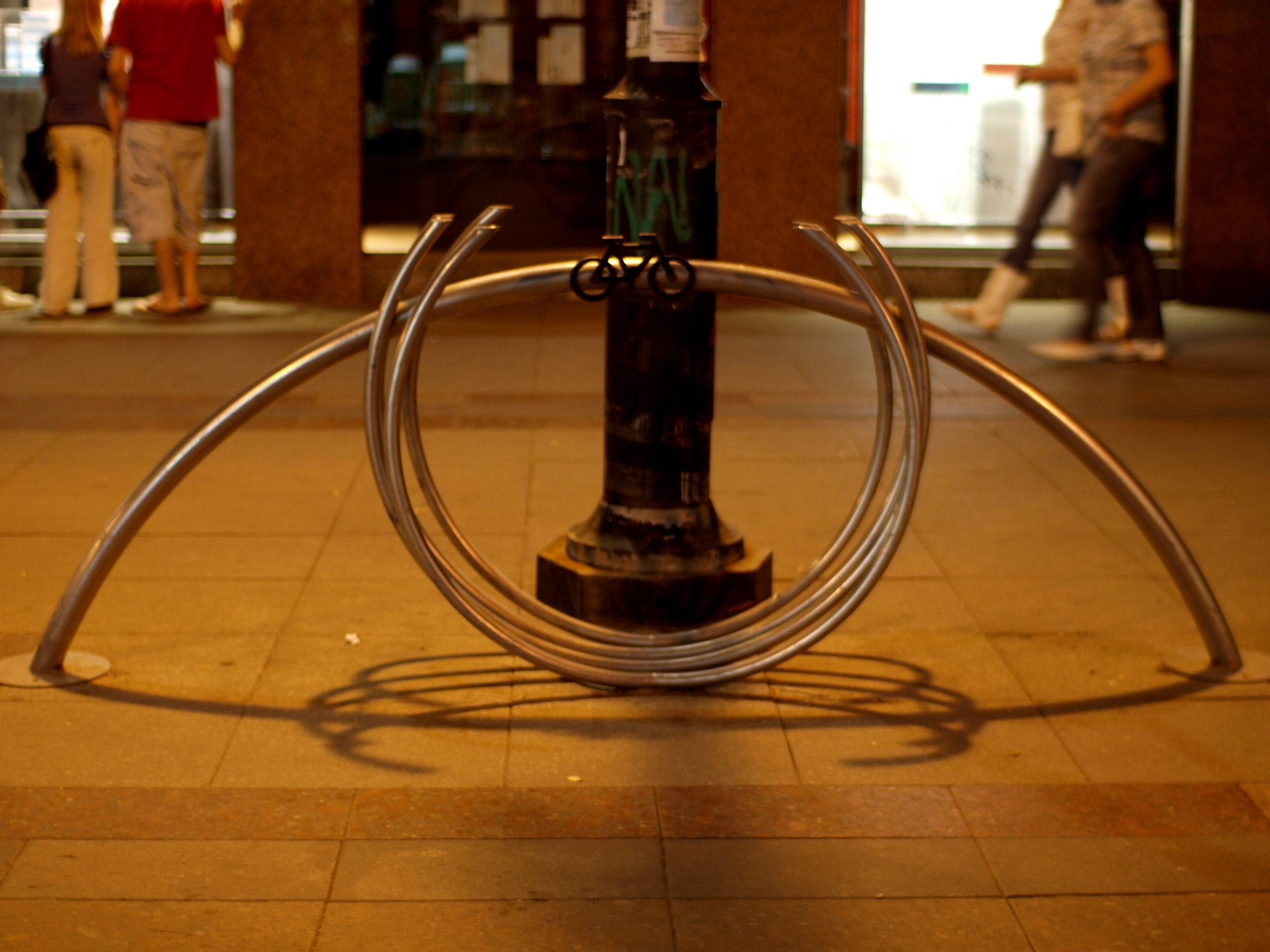 Bicycle rack in Skopje, Macedonia